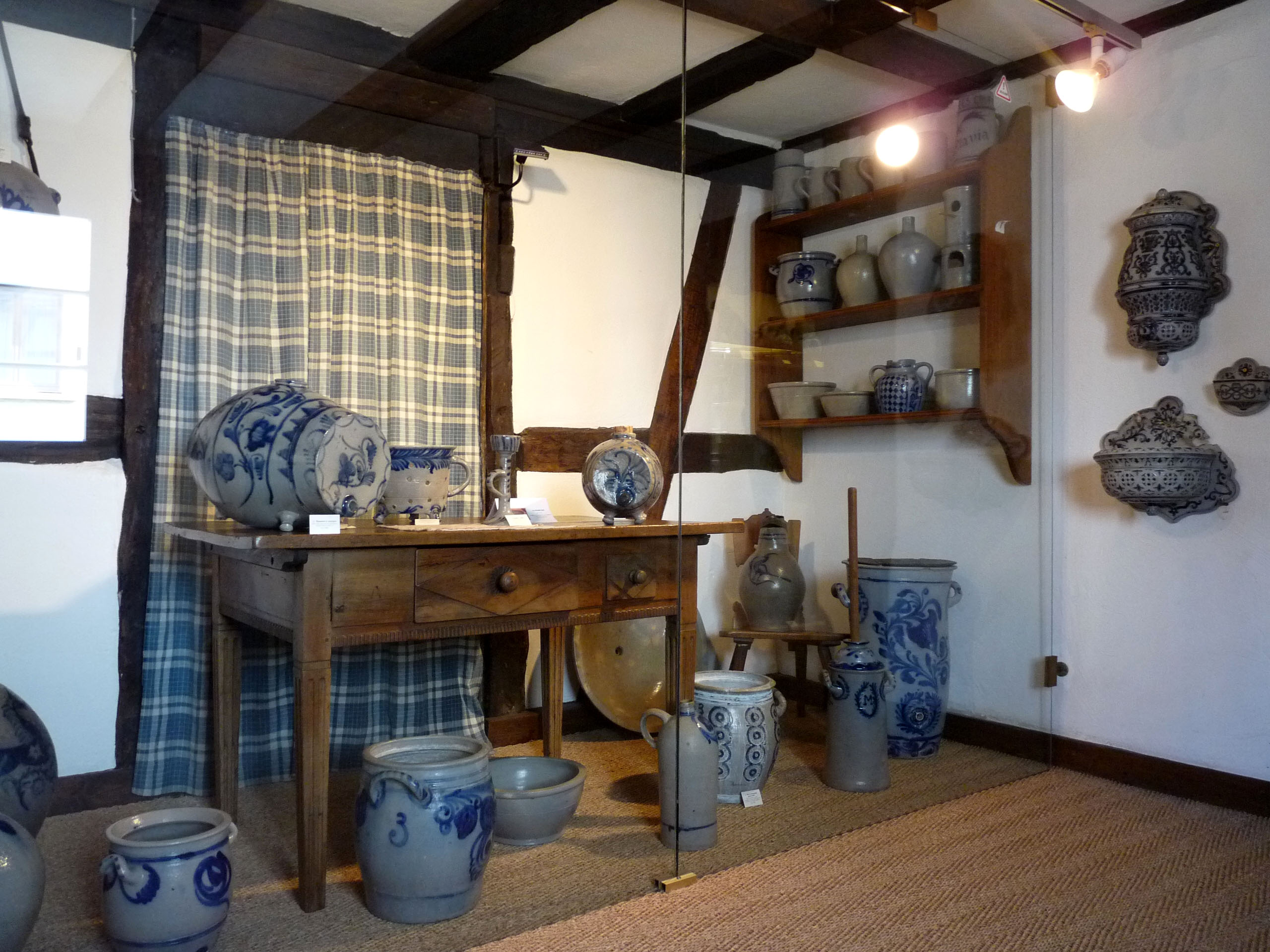 Musée de la poterie de Betschdorf (Bas-Rhin)